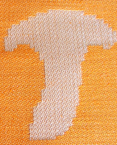 Detalj av 6-skaftad satin i damaststol vävd med dragutrustning.